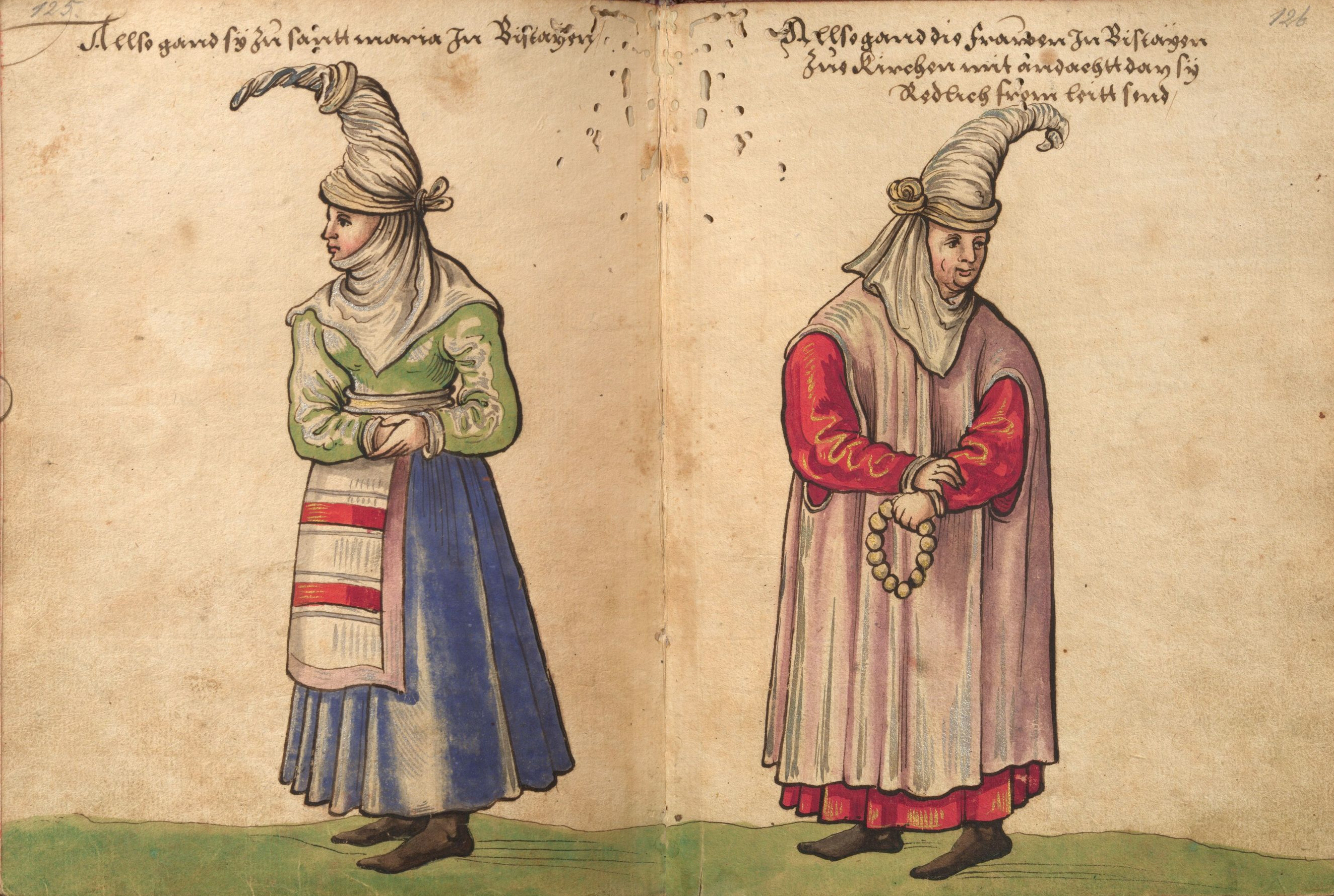 "Trachtenbuch" des Christoph Weiditz, Germanisches Nationalmuseum Nürnberg, Hs. 22474. Bl. 125–126 Tracht der Baskinnen in Sta. Maria / Wie die Baskenfrauen zum Gottesdienst gehen